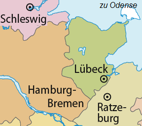 Bistum Lübeck vor der Reformation (kirchliche Diözesangrenzen)